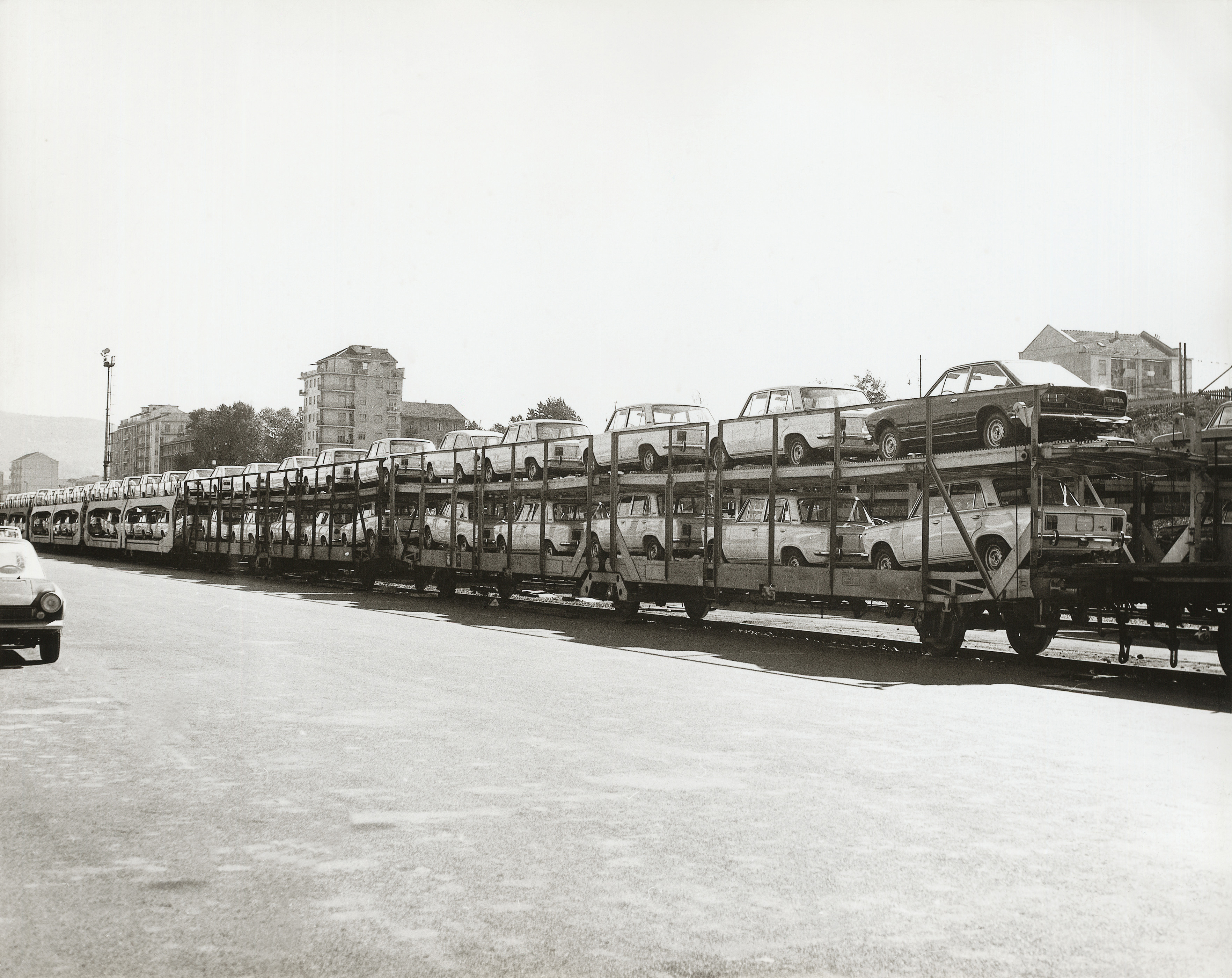 Treno carico SITFA anni 60